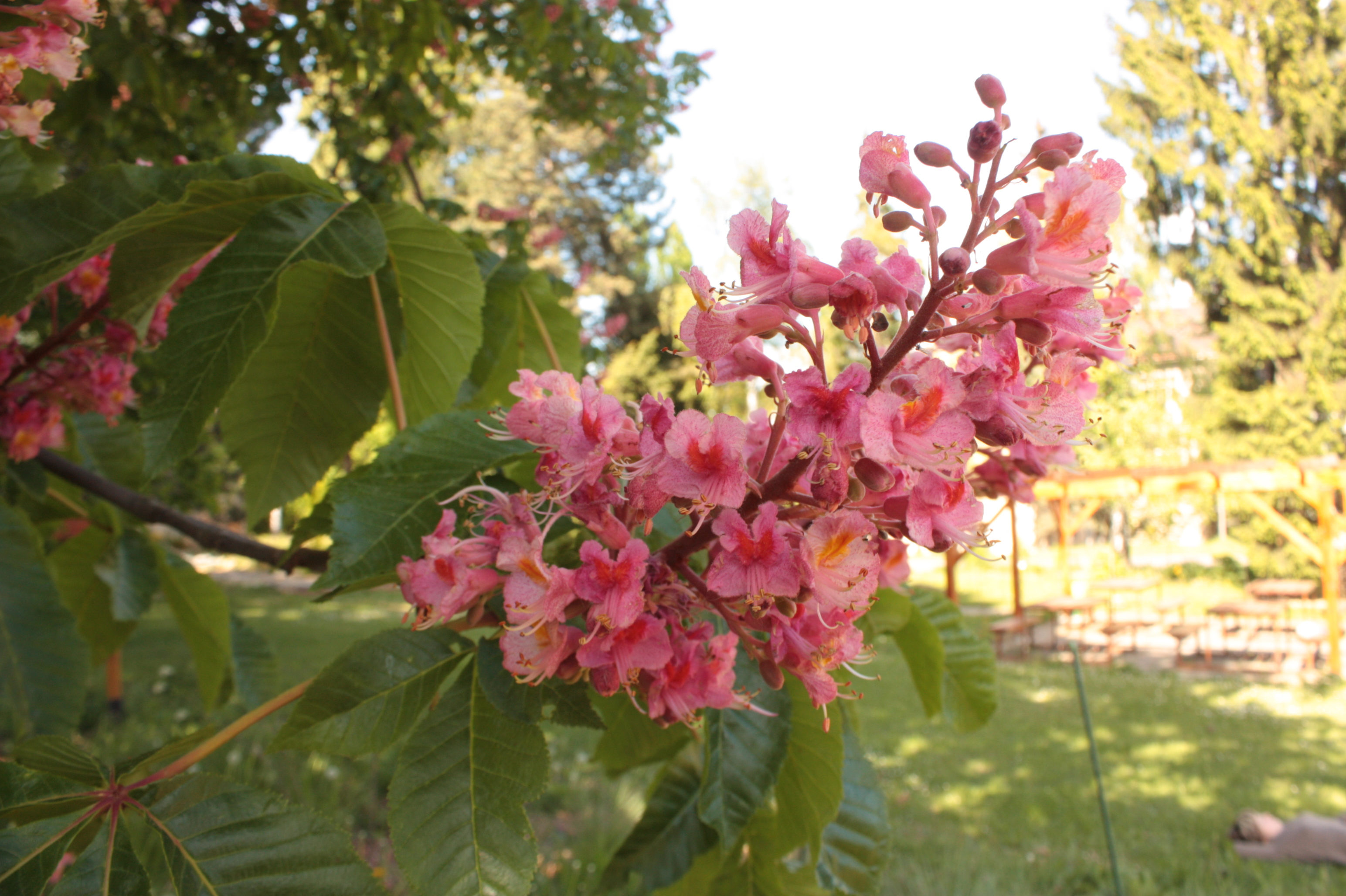 Aesculus × carnea, Plant collection of Gymnázium Brno-Řečkovice